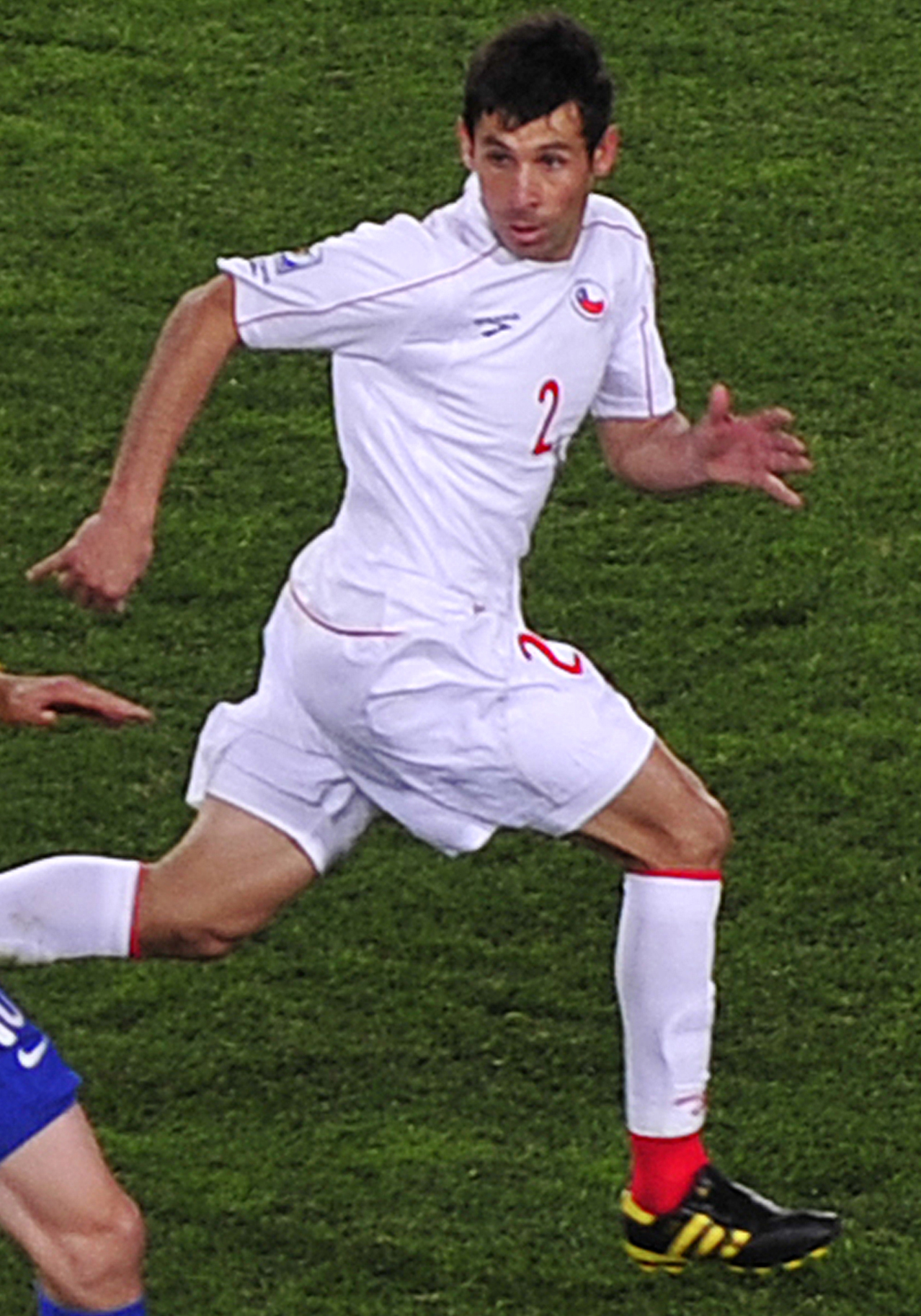 Joanesburgo - Kaká, um dos destaques da seleção brasileira na vitória sobre o Chile.